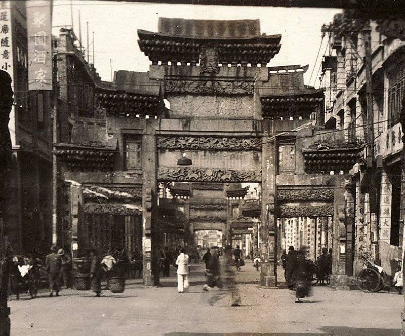 位於廣州中華中路的四牌樓（現解放中路一帶，其中四座已於文化大革命時期被毀）